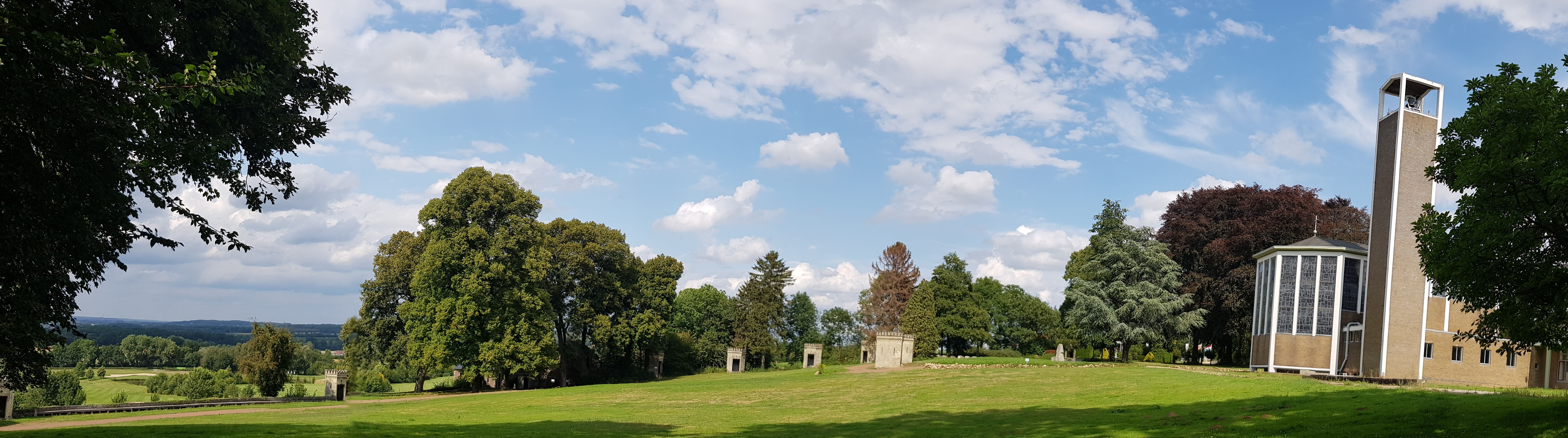 kruiswegstaties en Missiehuis, Cadier en Keer, Nederland